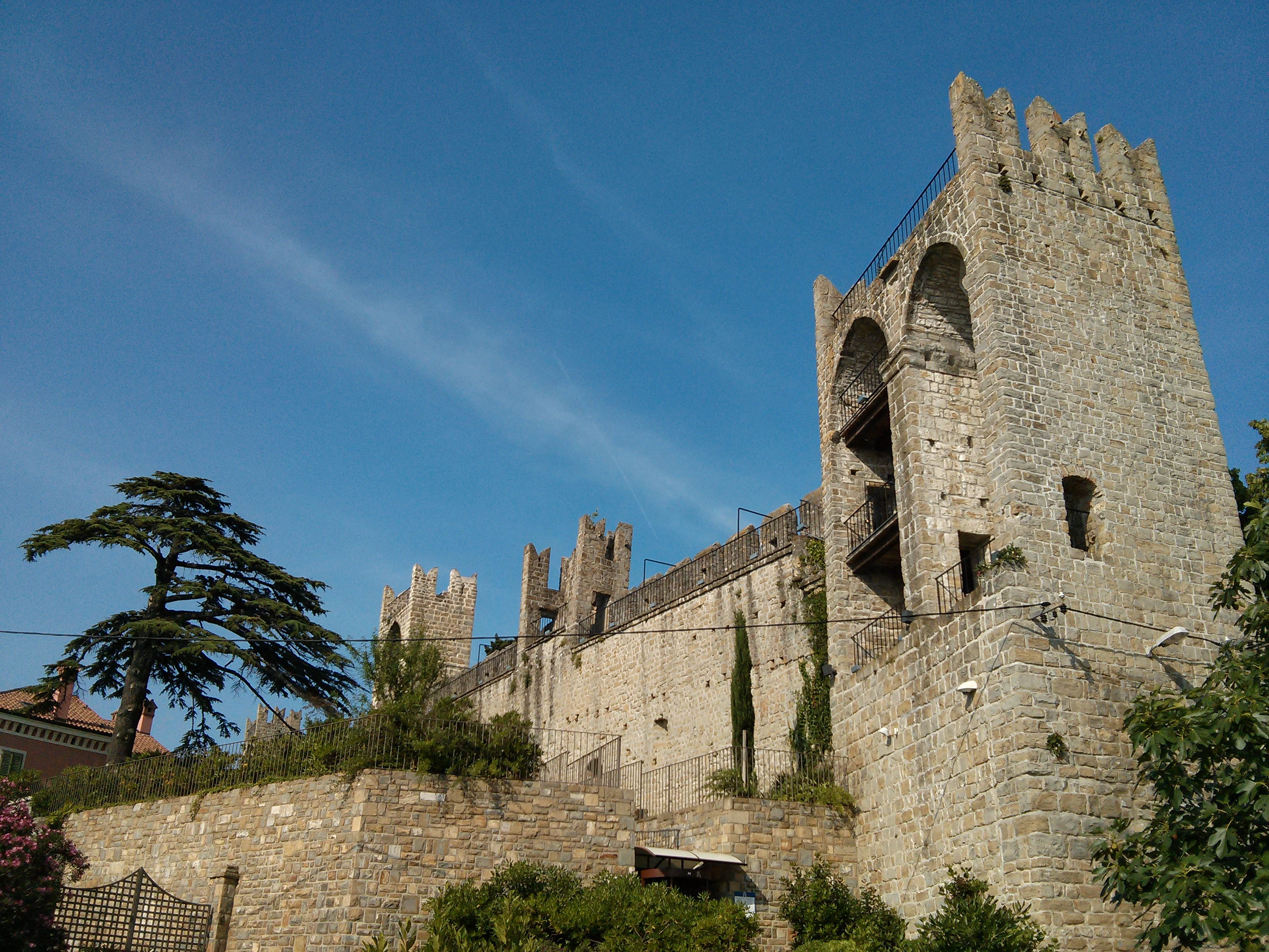 Mestno obzidje Piran